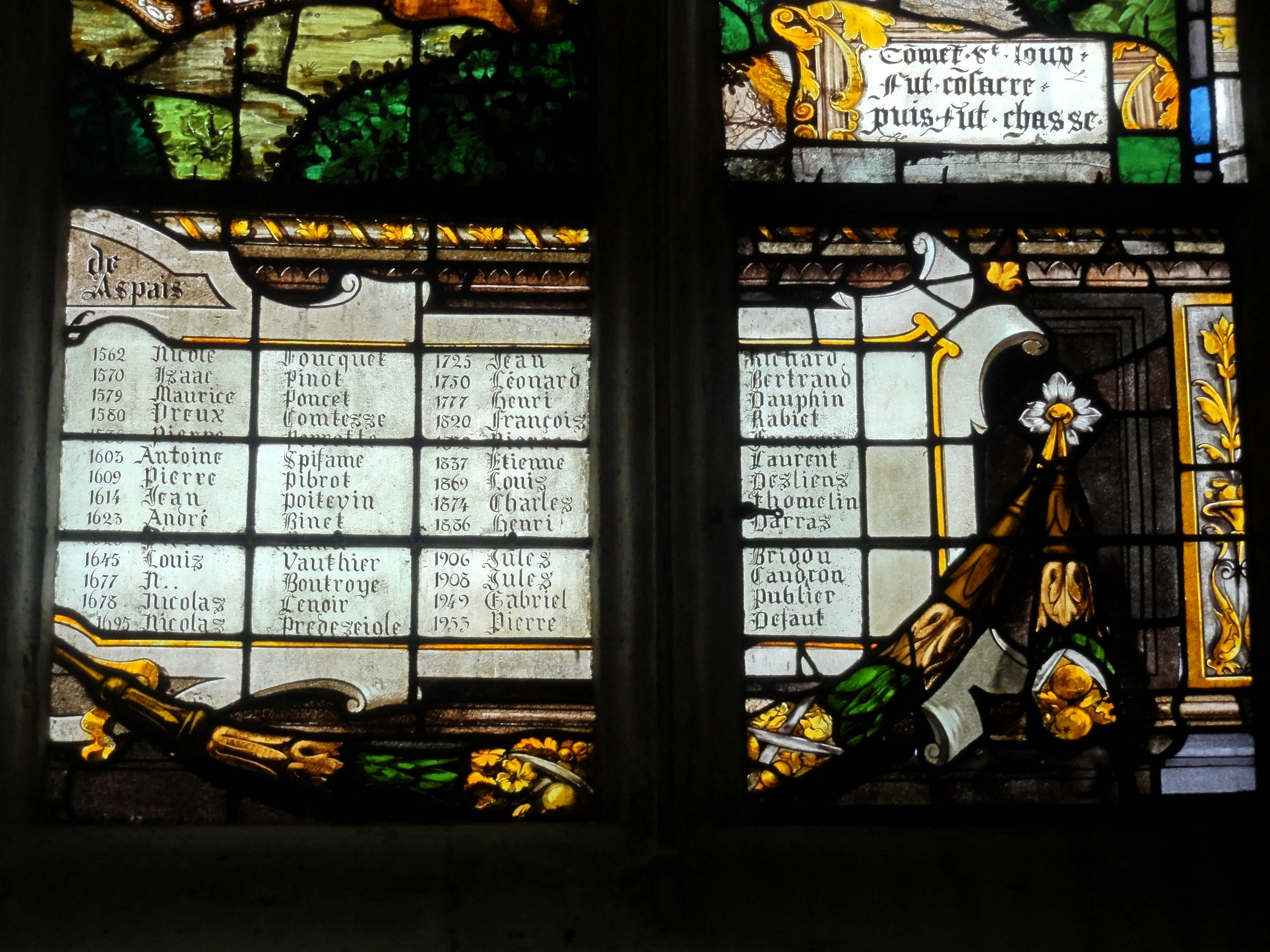 Vitrail de saint Loup de Sens ; ajout moderne : liste des curés.